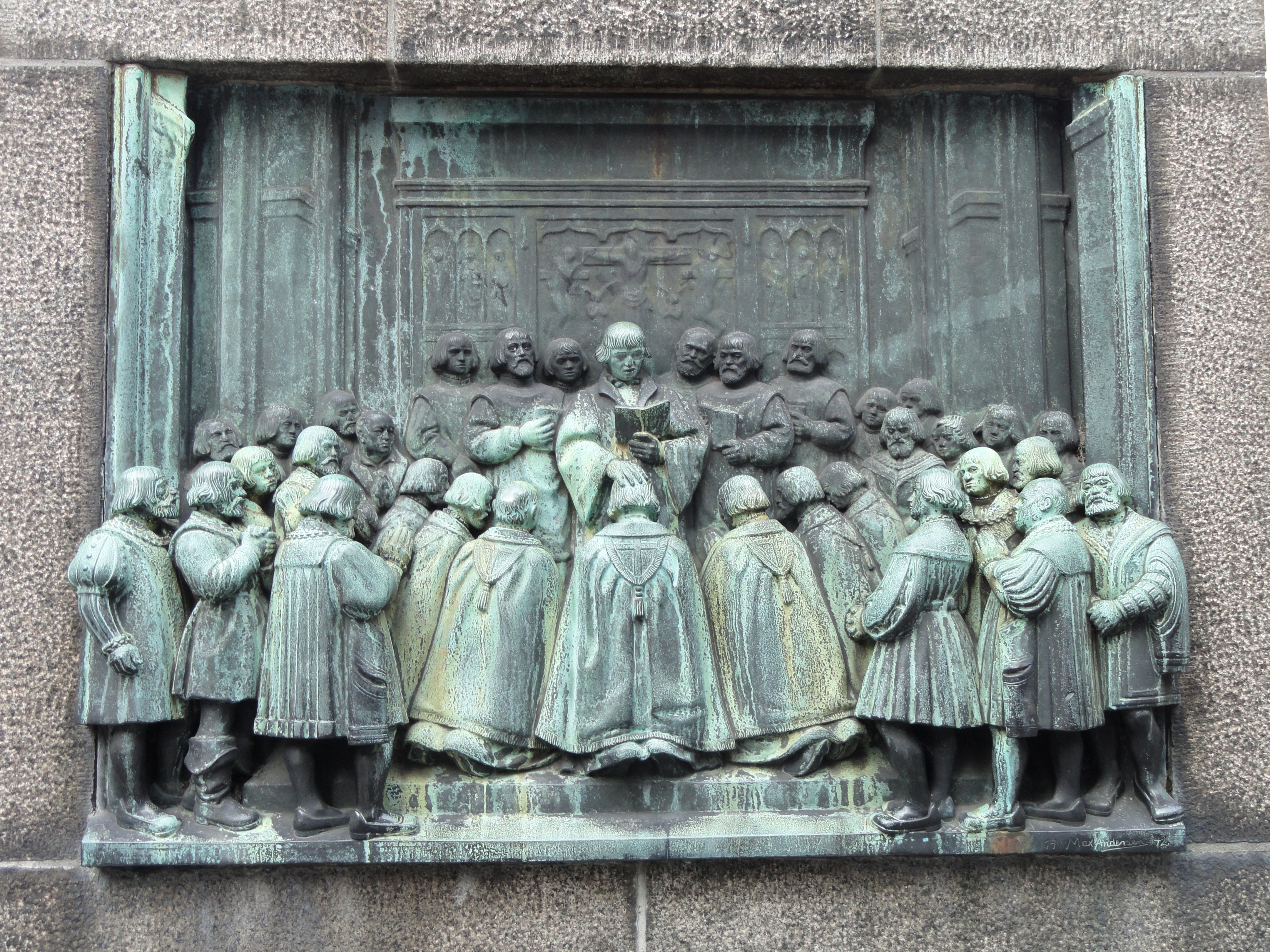 Reformationsmonumentet, Bispetorv, Copenhagen, Denmark.